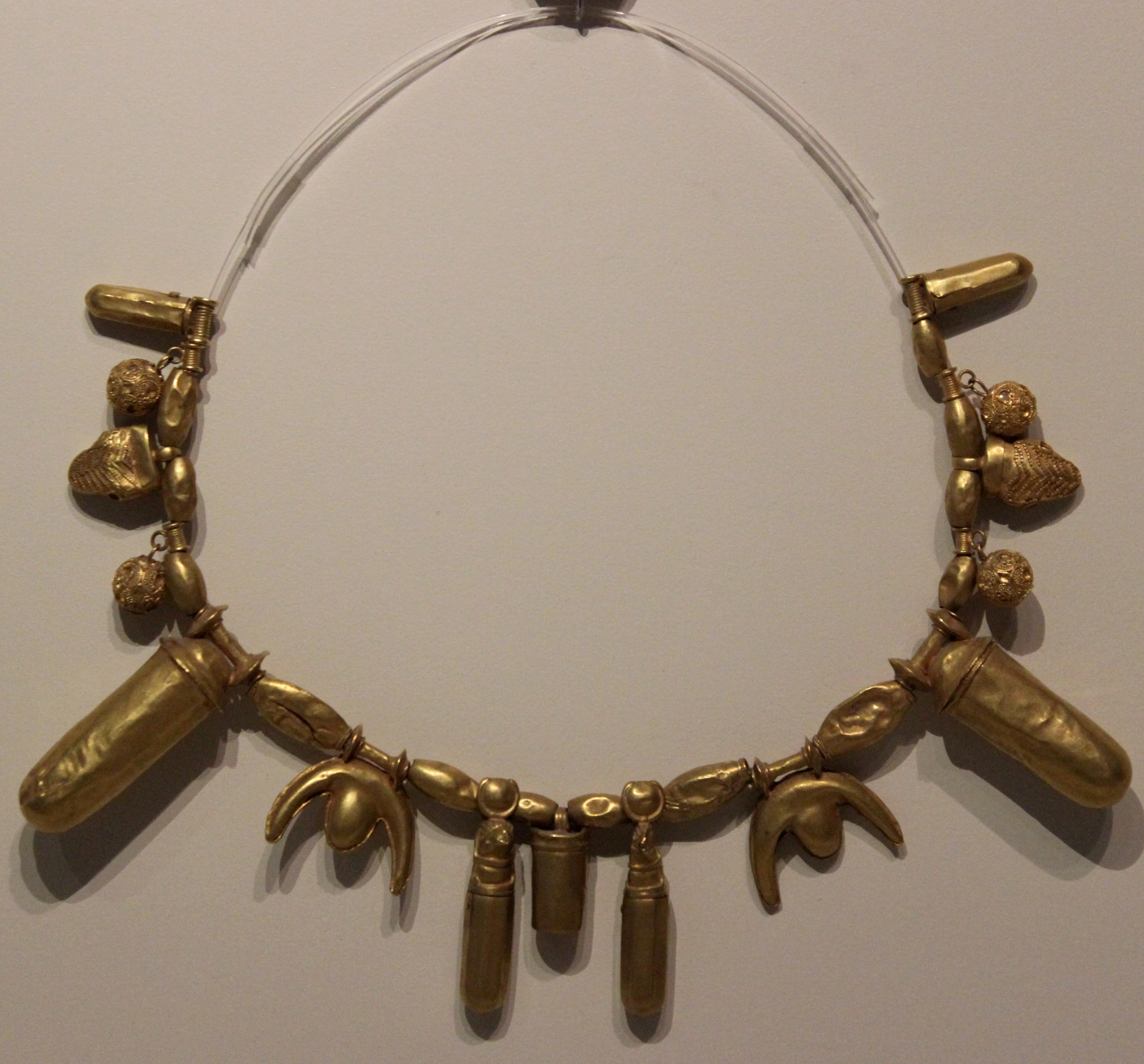 Madrid, M.A.N. Tesoro de Aliseda, collar.